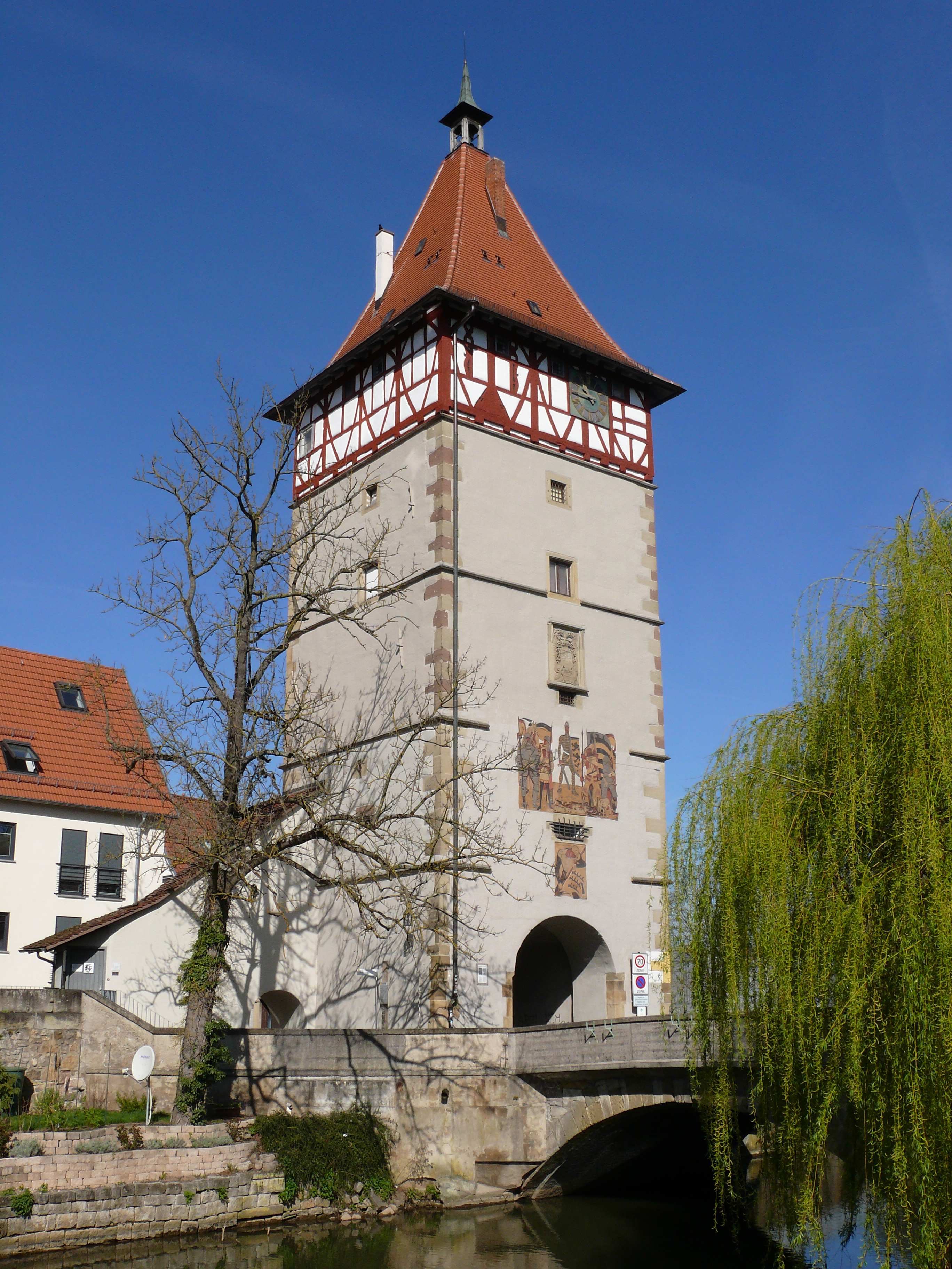 Der Beinsteiner Torturm in Waiblingen. Ansicht an der Rems.